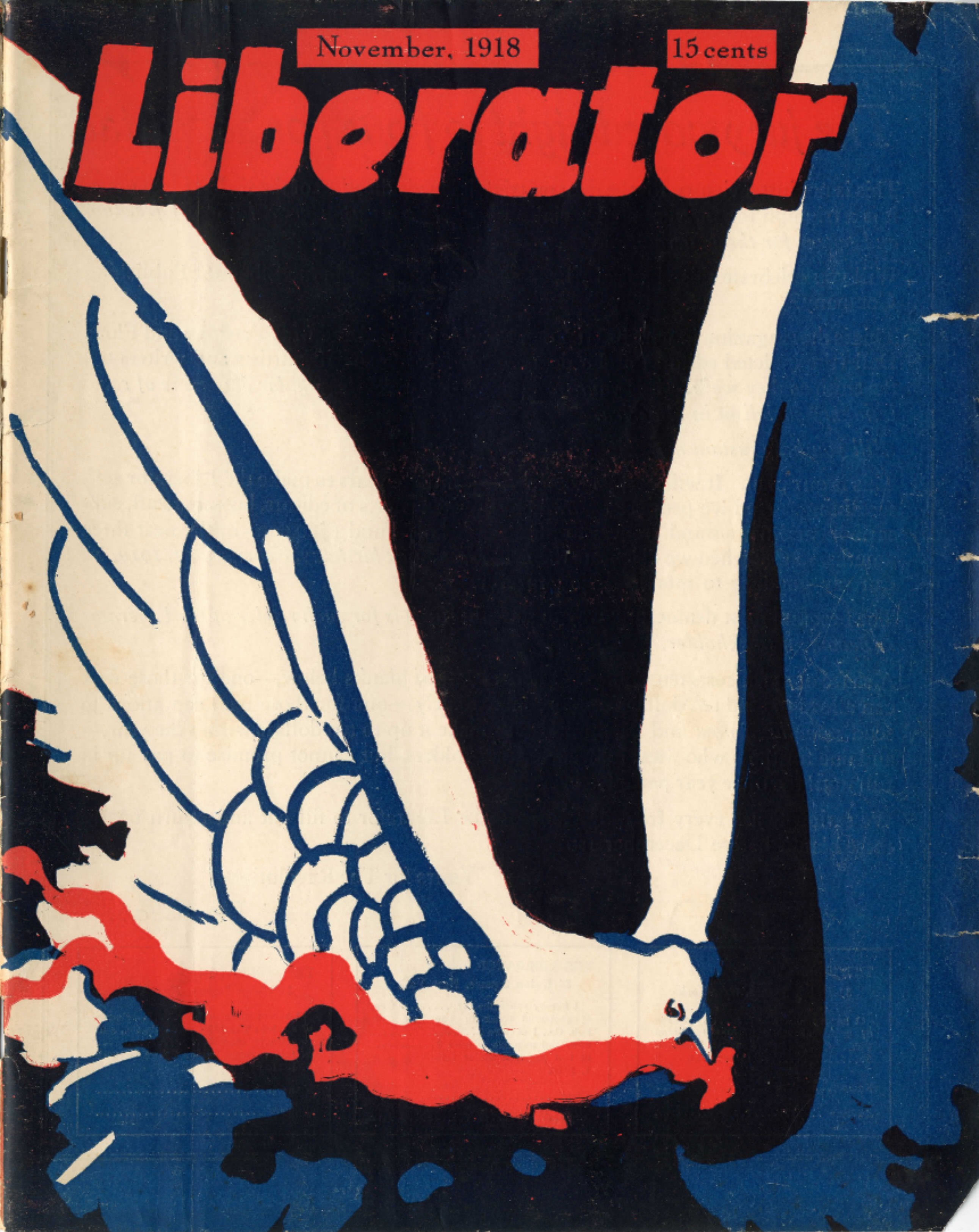 Portada del número de noviembre de 1918 de The Liberator.